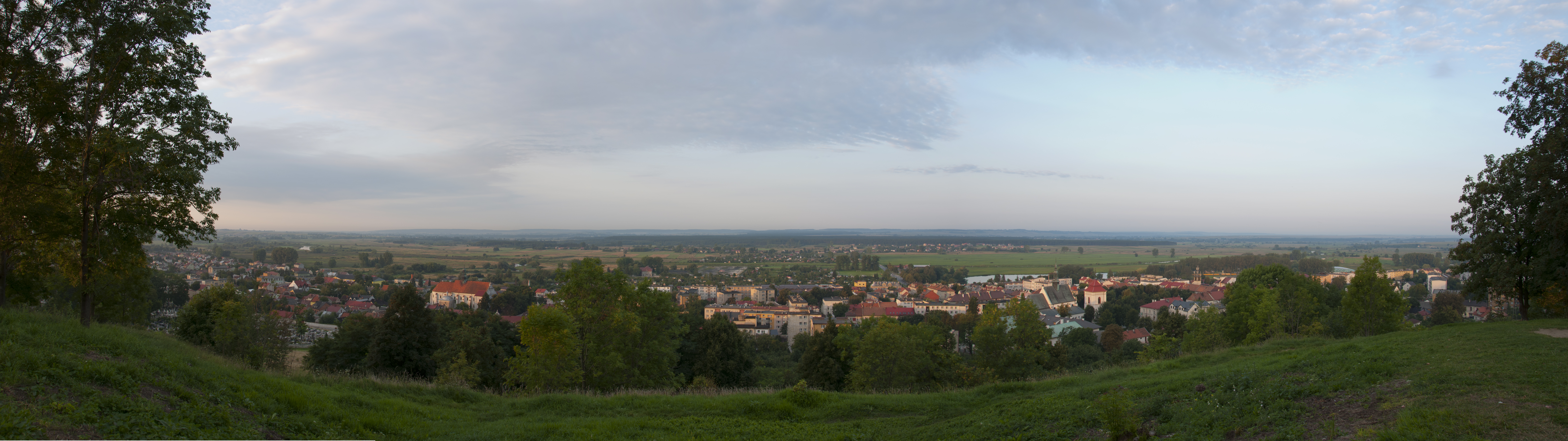 Pińczów panorama